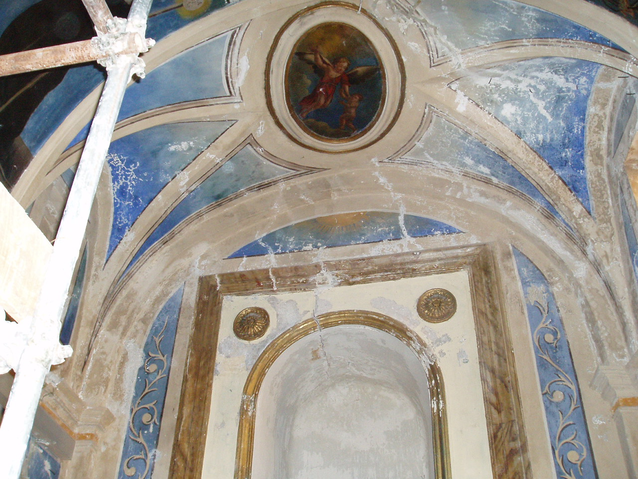 Chiesa S.Maria Assunta nel comune di Rocca Canterano (provincia di Roma).